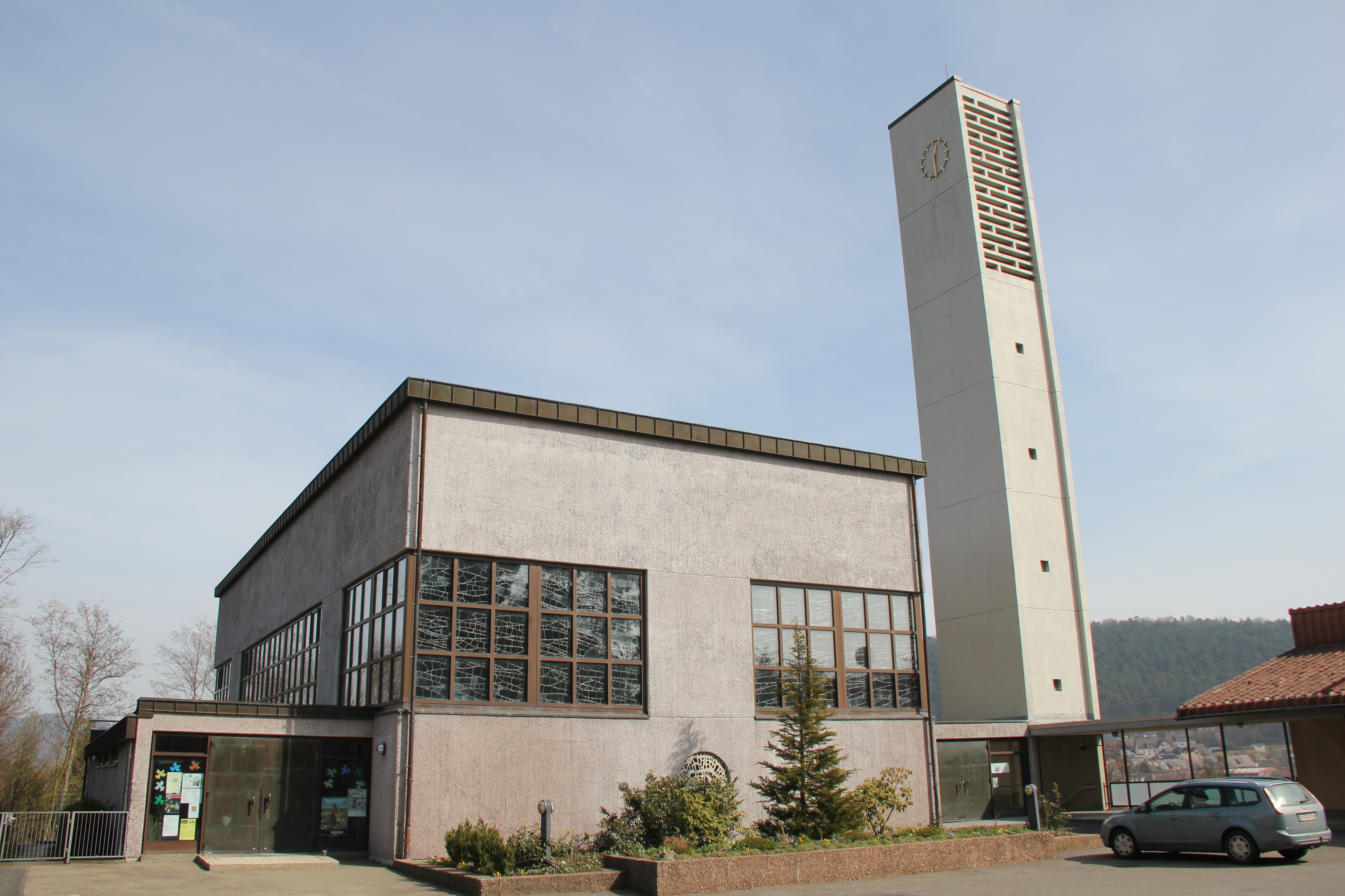 Kath. Kirche St. Maria in Wolfhagen